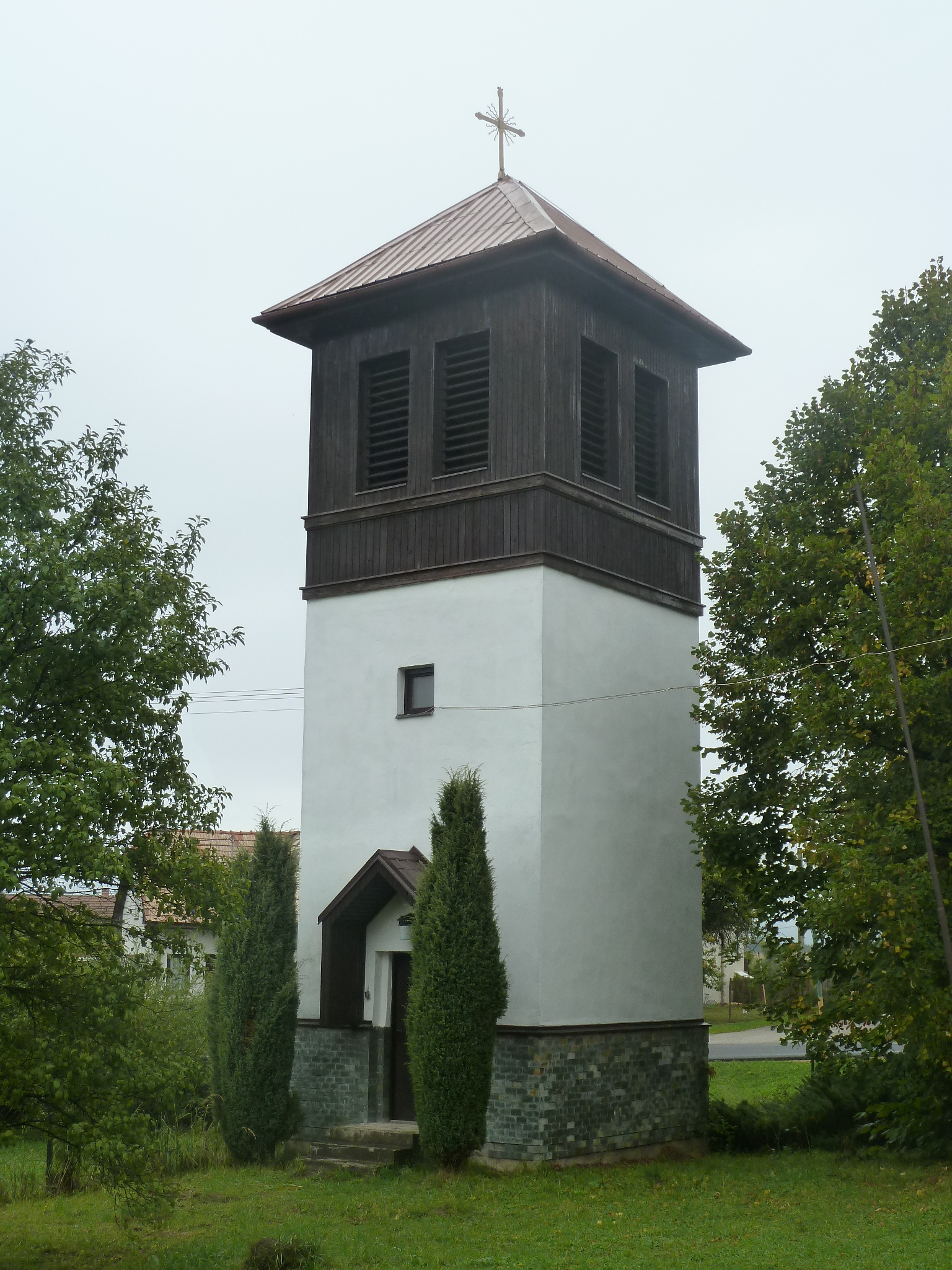 Zvonica v Dubovom